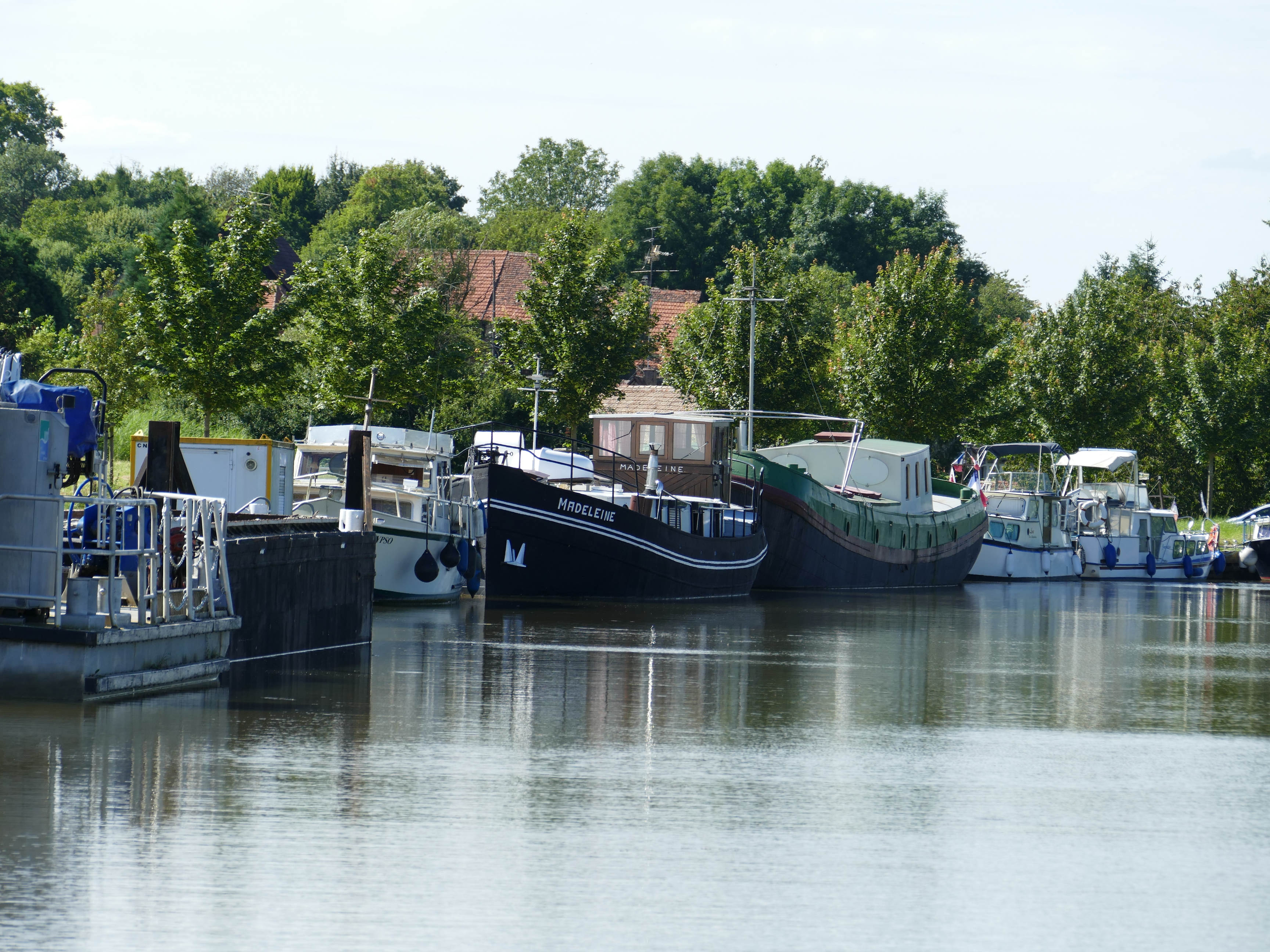 Der Hafen Bissert-Harskirchen am Saar-Kanal